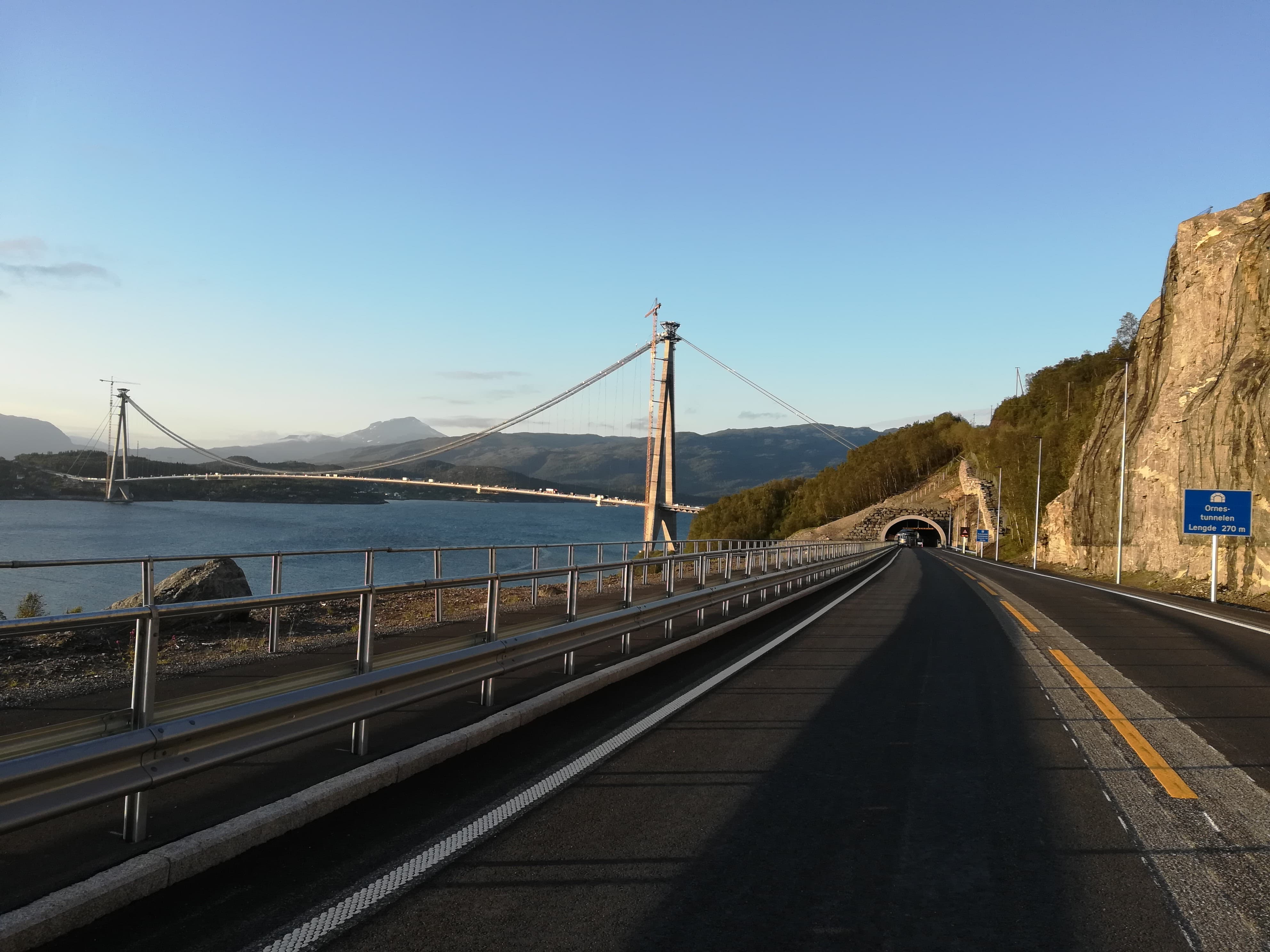 Ornestunnelen og Hålogalandsbrua. Narvik.